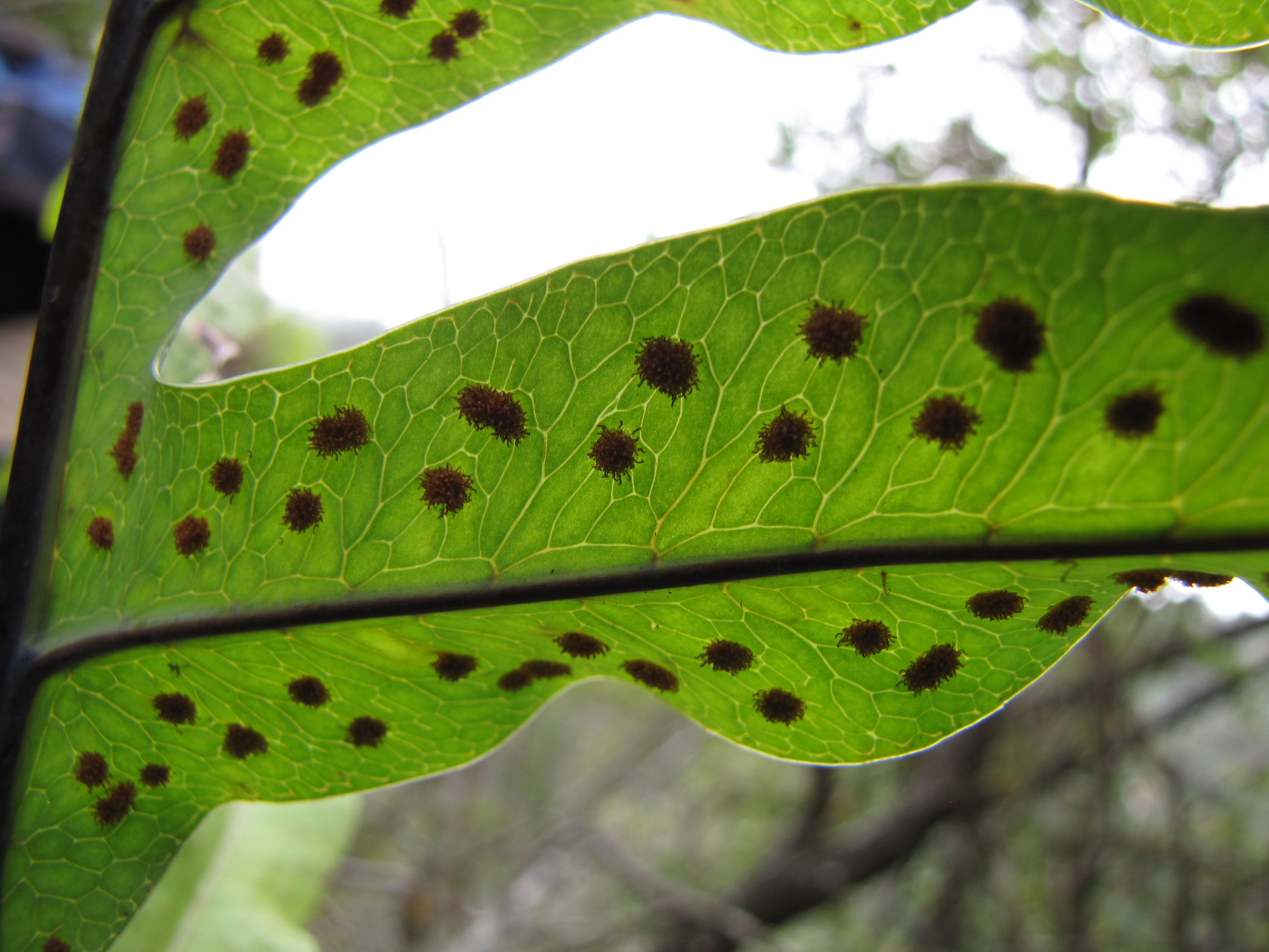 Phlebodium aureum (Lauae haole) Sori at Waikapu Valley, Maui, Hawaii. April 25, 2012 #120425-4971 Image Use Policy